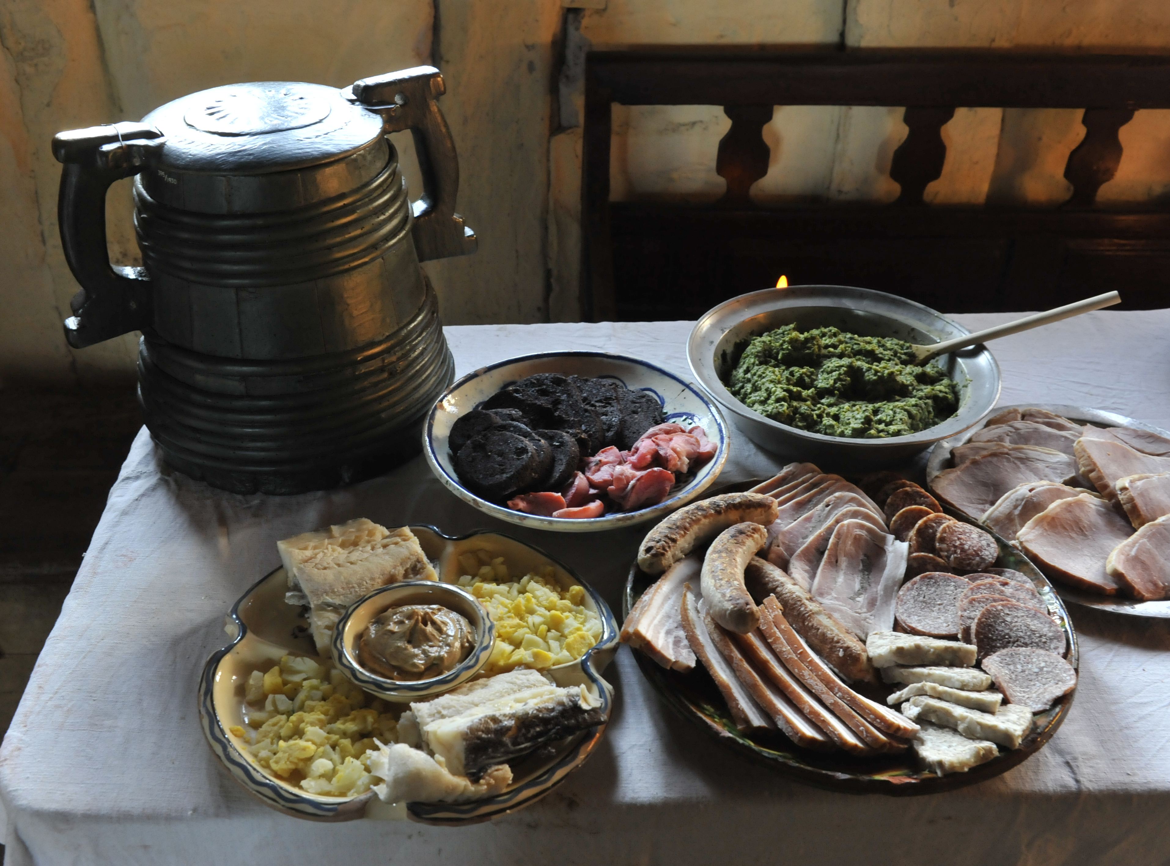 Julemad på Frilandsmuseet